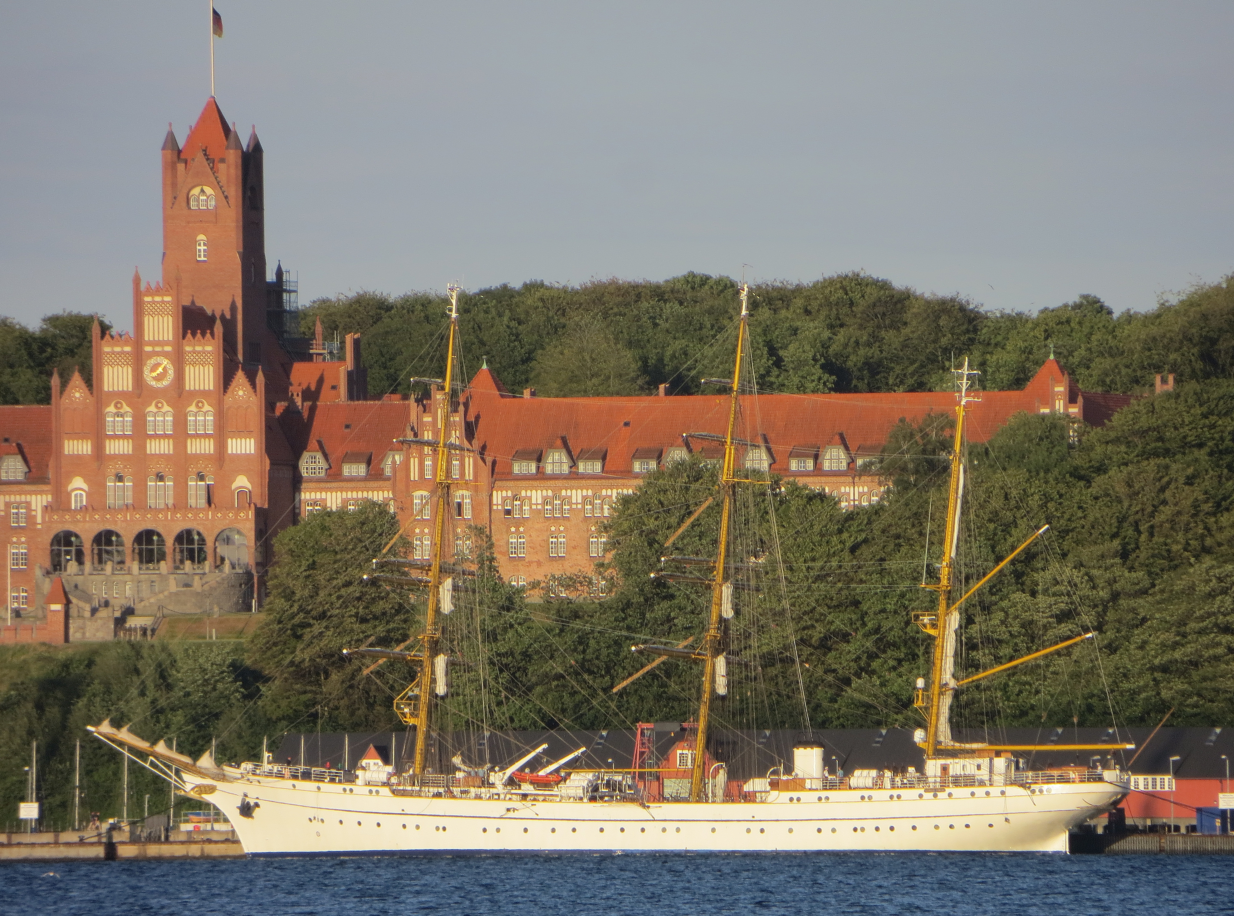 Marineschule Mürwik (Flensburg) mit der vor ihr am Liegeplatz liegenden Gorch Fock